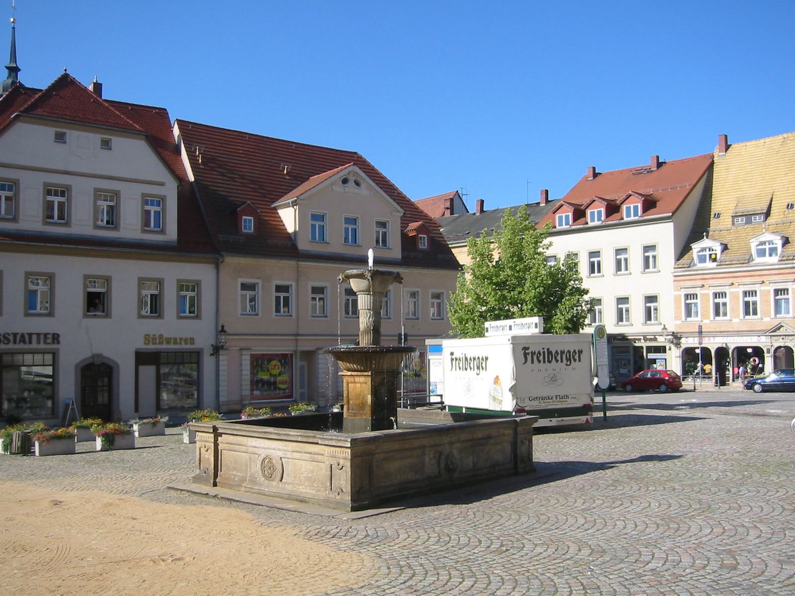 Marktplatz mit Springbrunnen in Oederan